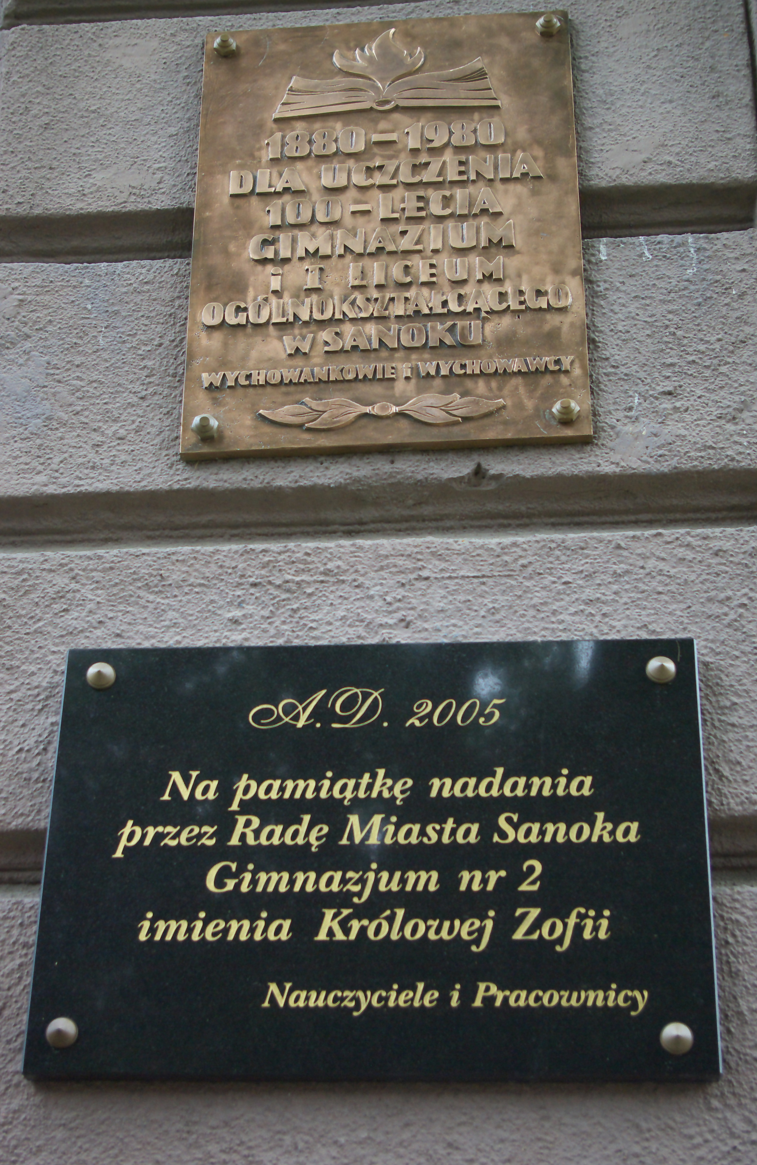 Gimnazjum nr 2 im. Królowej Zofii w Sanoku. Tablice upamiętniające